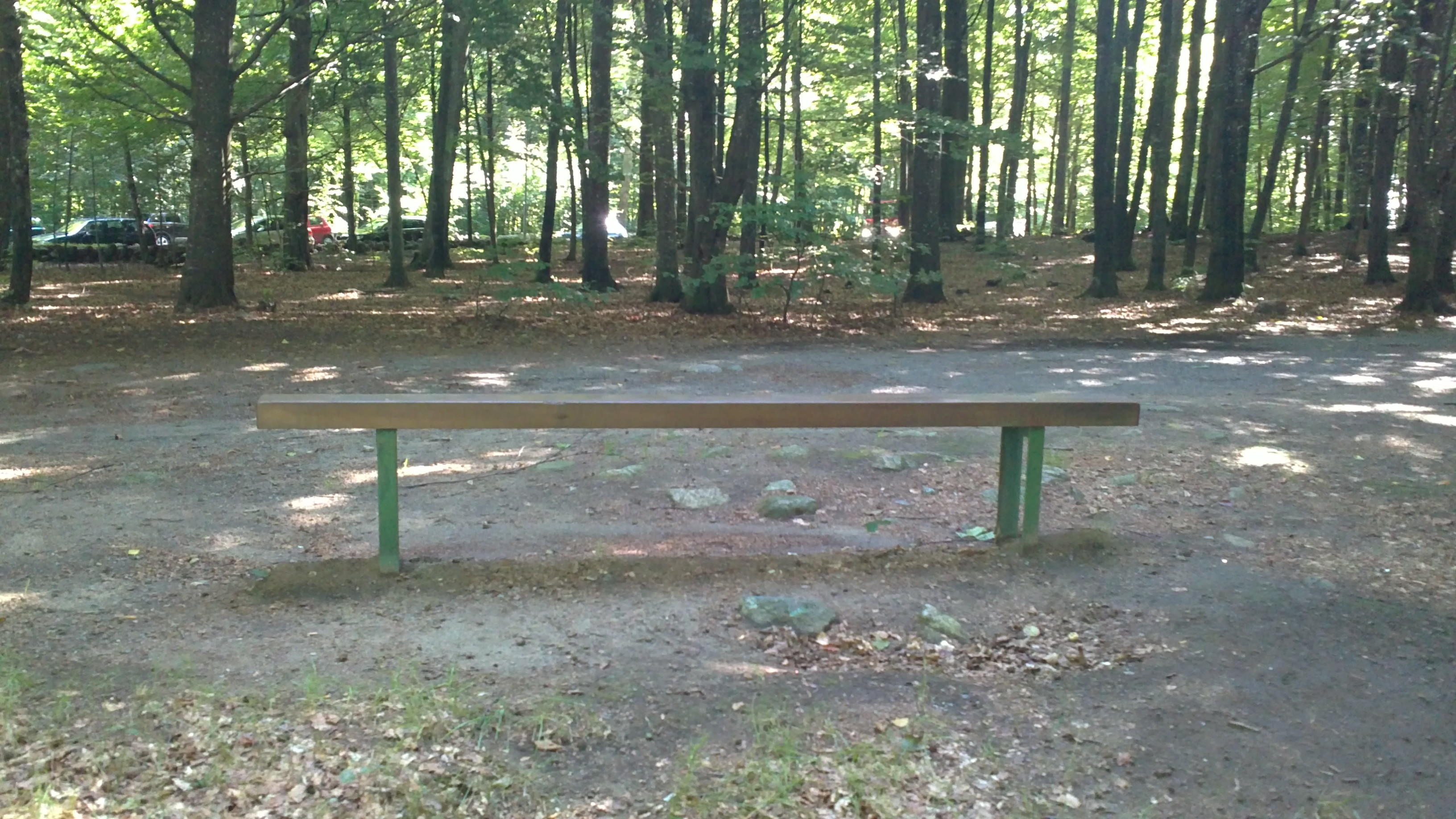 Bilde av benken "Biografen" i Bøkeksogen